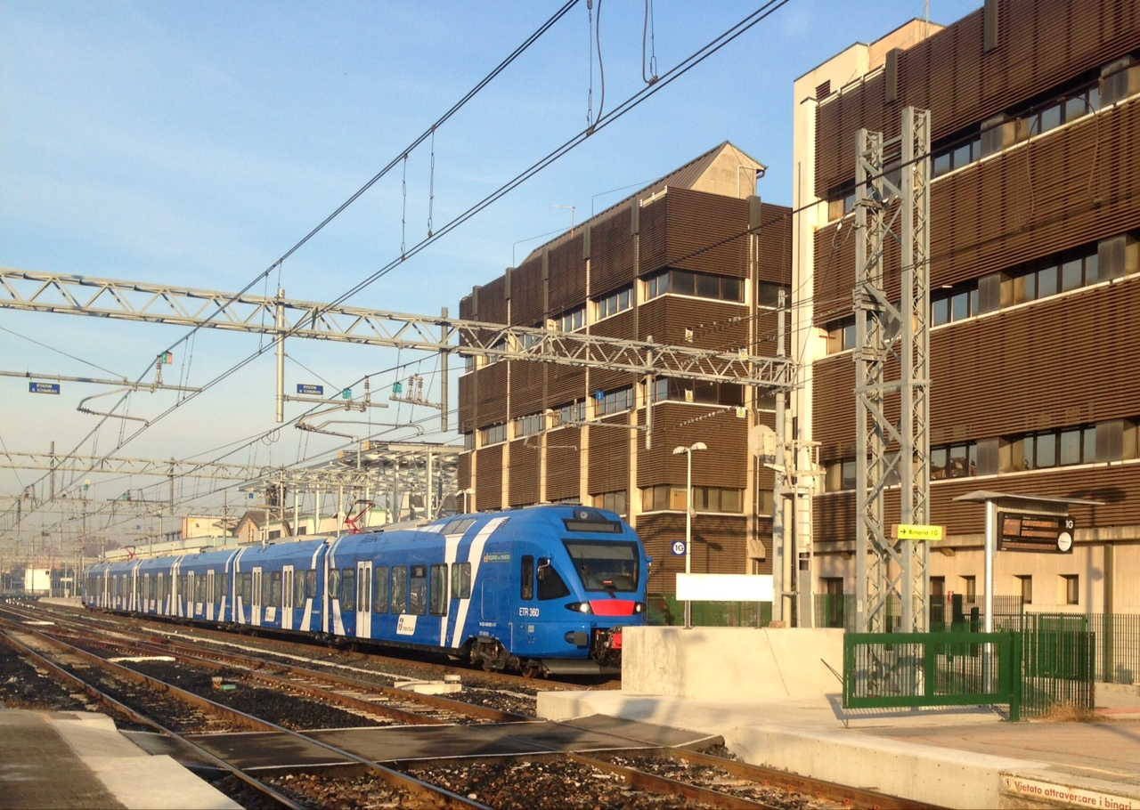 Un ETR Flirt a Venezia Mestre al binario 1 G in partenza per Portogruaro come treno regionale di Trenitalia.